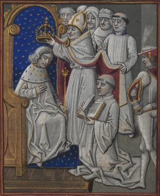 Couronnement de Baudouin IX